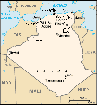 Wikimedia Commons'daki Algeria map-FR.png dosyasından Türkçeleştirdim. Türkçeleştirme için kaynak: Faik Sabri Duran, Büyük Atlas Filanca 08:34, 3 Mart 2007 (UTC)